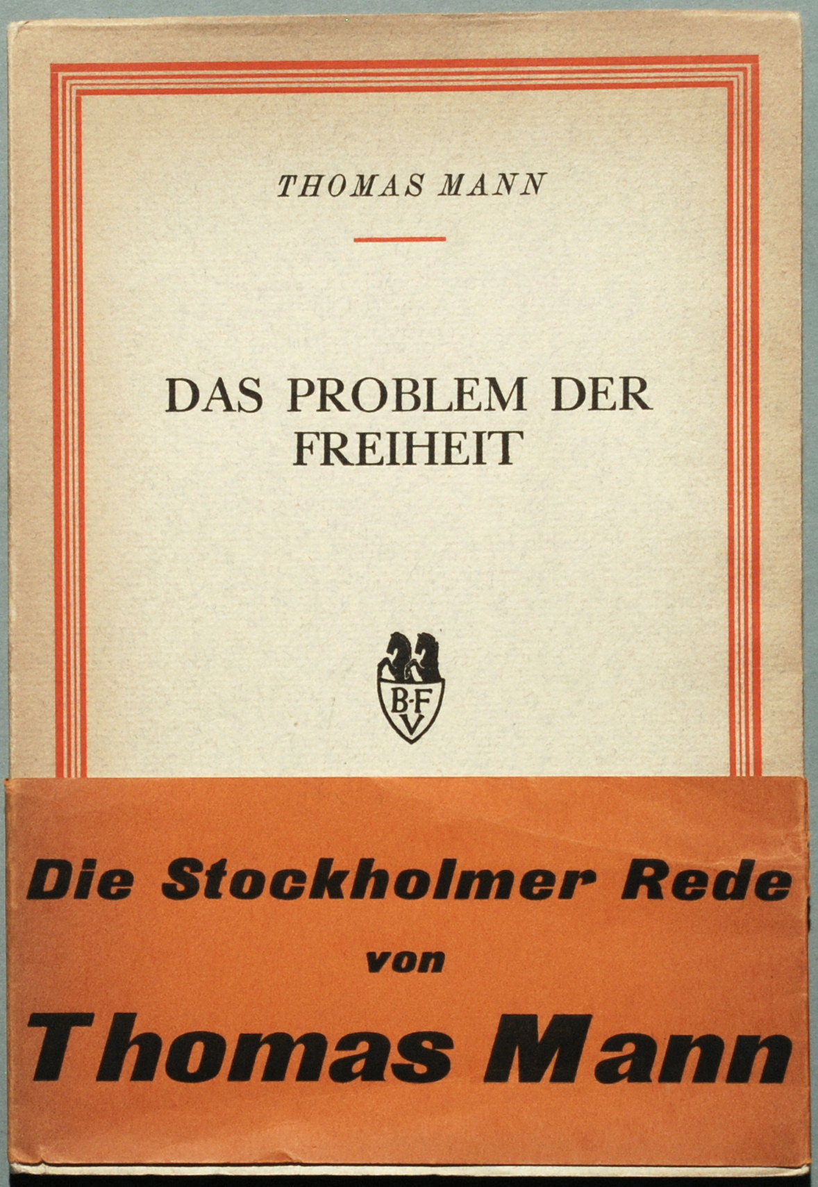 Thomas Mann: Das Problem der Freiheit. Rede [nicht] gehalten auf der Sitzung des XVII. Internationalen P. E. N. – Kongresses im September 1939. Stockholm: Bermann – Fischer 1939, 37 Seiten. Erstdruck (Potempa G 723.1, Bürgin I 57, Wilpert/Gühring² 78). Orig.- Broschur 22,5 x 15,5 cm.